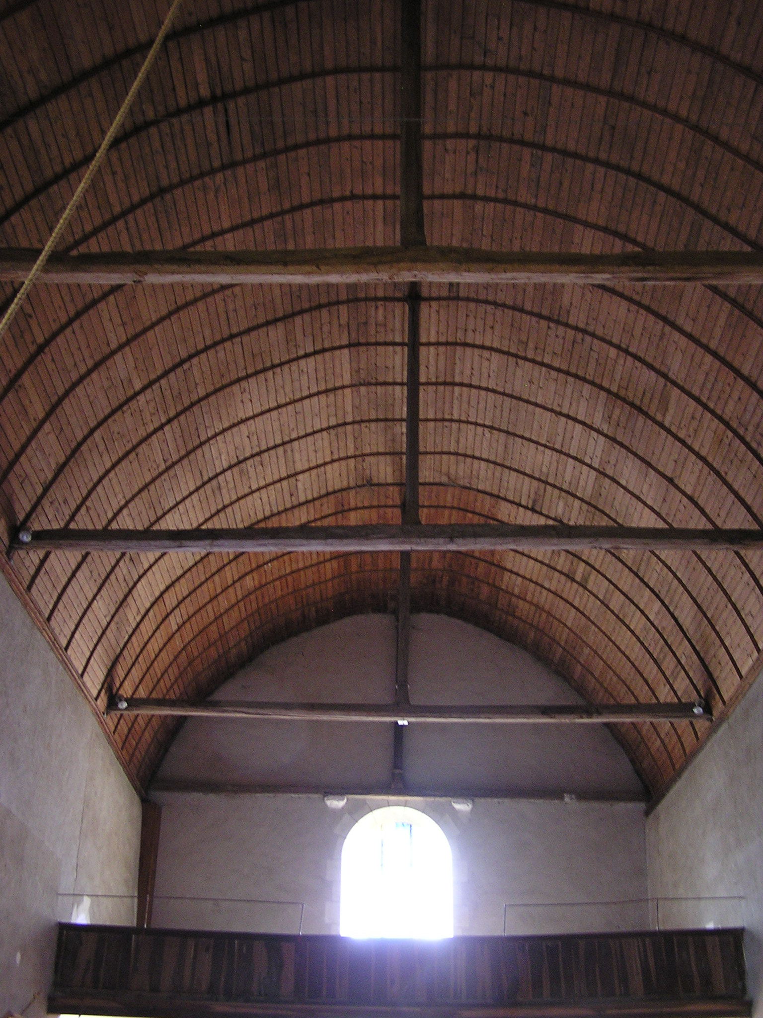 Vue du fond (à l'ouest) de la voûte lambrissée de la nef de l'église de la Chapelle-Huon